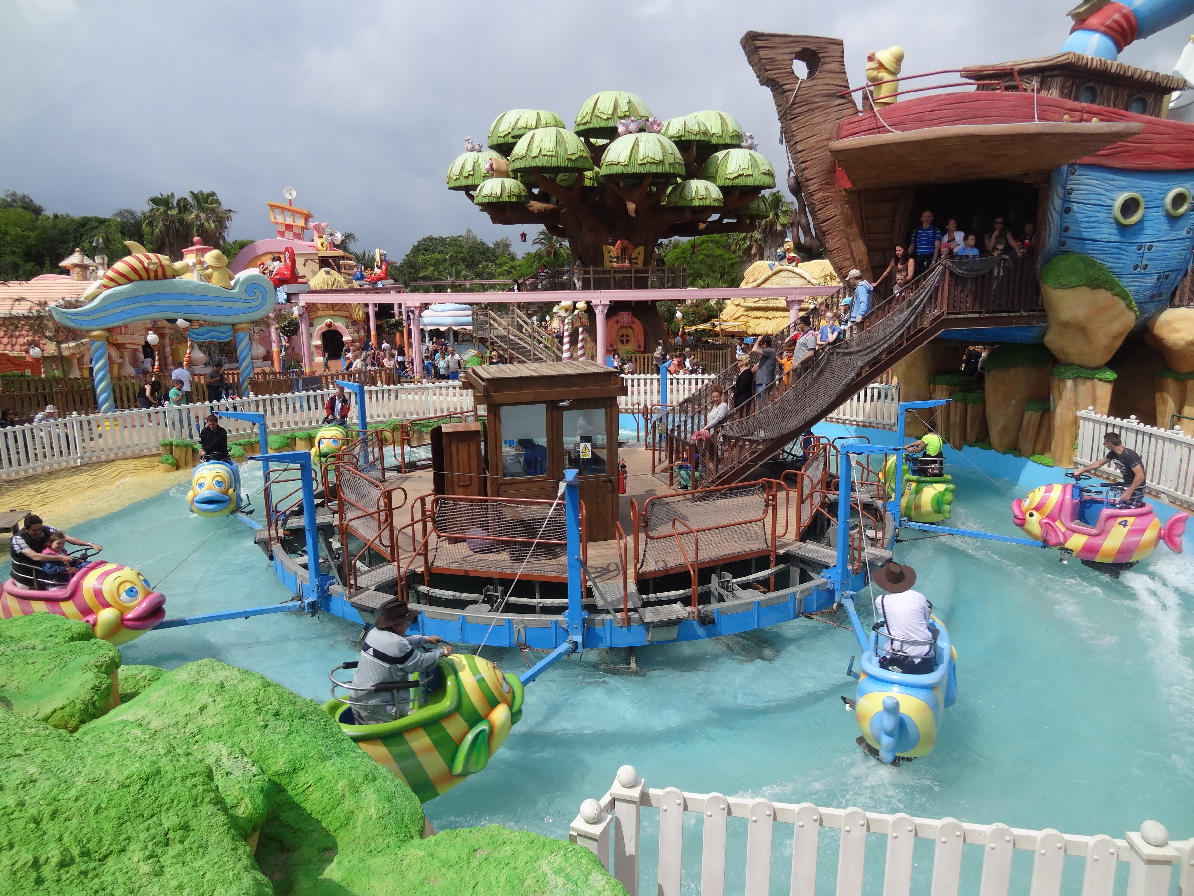 Magic Fish à Port Aventura